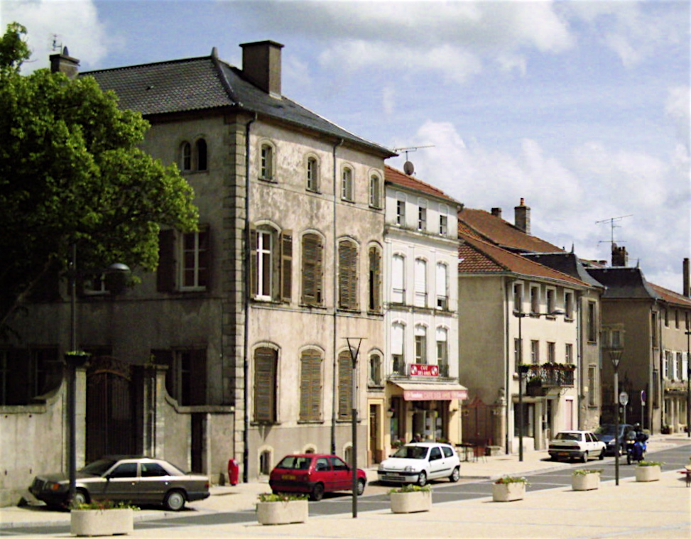 Vic-Sur-Seille 57 France, Place Jeanne d'Arc.